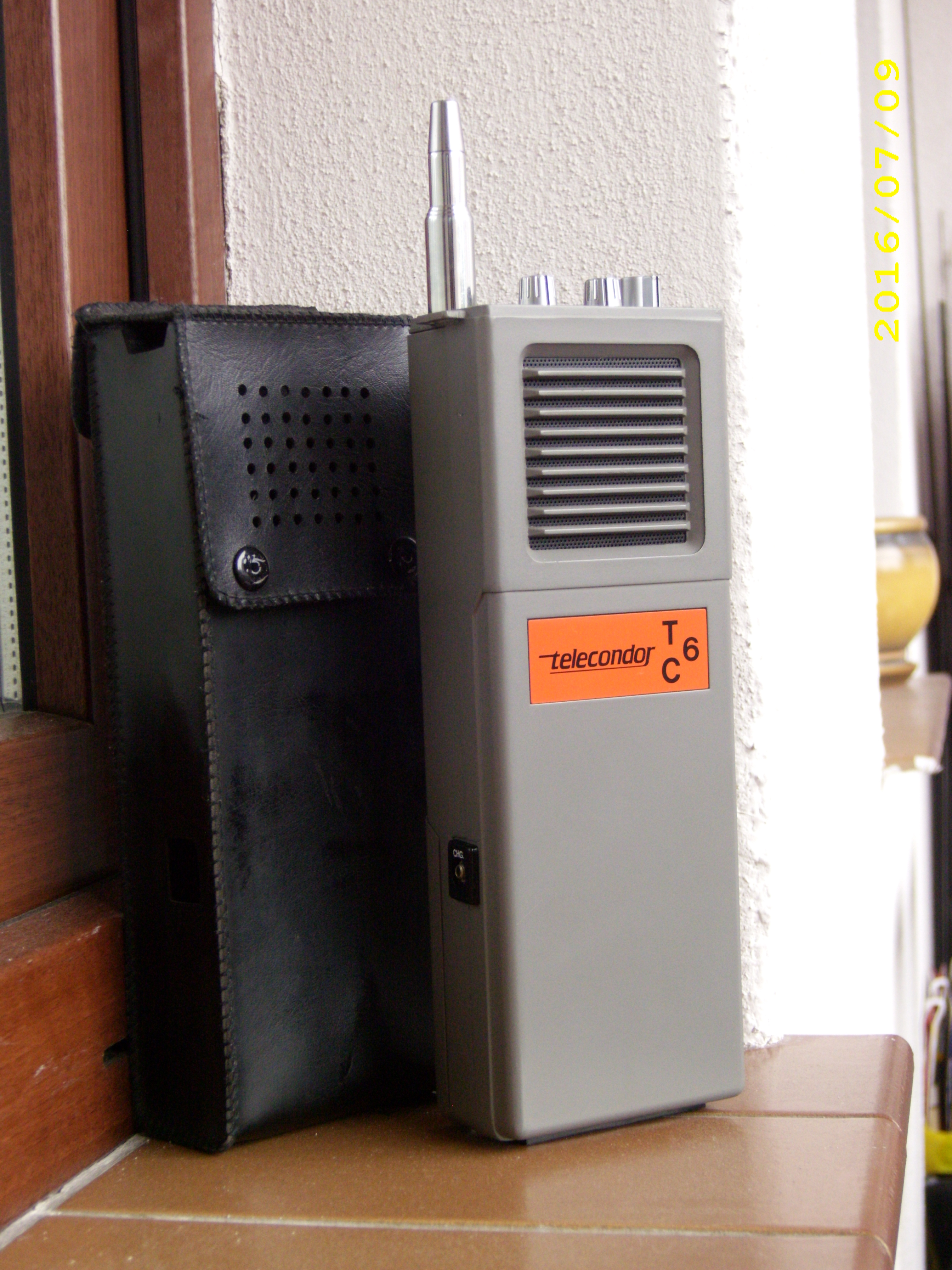 Radiostacja krótkofalowa przenośna, noszona w dłoni małej mocy. Moc nadajnika 250-300mW, modulacja AM. Pasmo pracy 27Mhz. Długość anteny teleskopowej 135cm. Zasięg w terenie otwartym i płaskim około 1 km. Zasilanie 12V, pobór prądu 35 mA odbiornik bez sygnału, 150mA nadajnik bez modulacji, z modulacją do 250mA. Czułość odbiornika 2uV dla 10dB S/N. Projekt w celu redukcji kosztów - wiele firm z Japonii, Korei, Tajwanu. Sprzedaż na terenie Europy pod różnymi nazwami. Na tabliczce znamionowej podano moc 2W , to jest moc zasilania dostarczona do stopnia mocy nadajnika, dokładniej jest to ówczesny standard nadawania zezwoleń - urządzenia mogły posiadać maksymalną moc INPUT do 2W (dostarczoną do stopnia końcowego nadajnika). Moc wyjściowa była podana w dokumentacji technicznej.